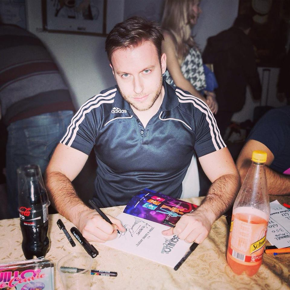 immanuel casto 2015 firmacopie cartoomics